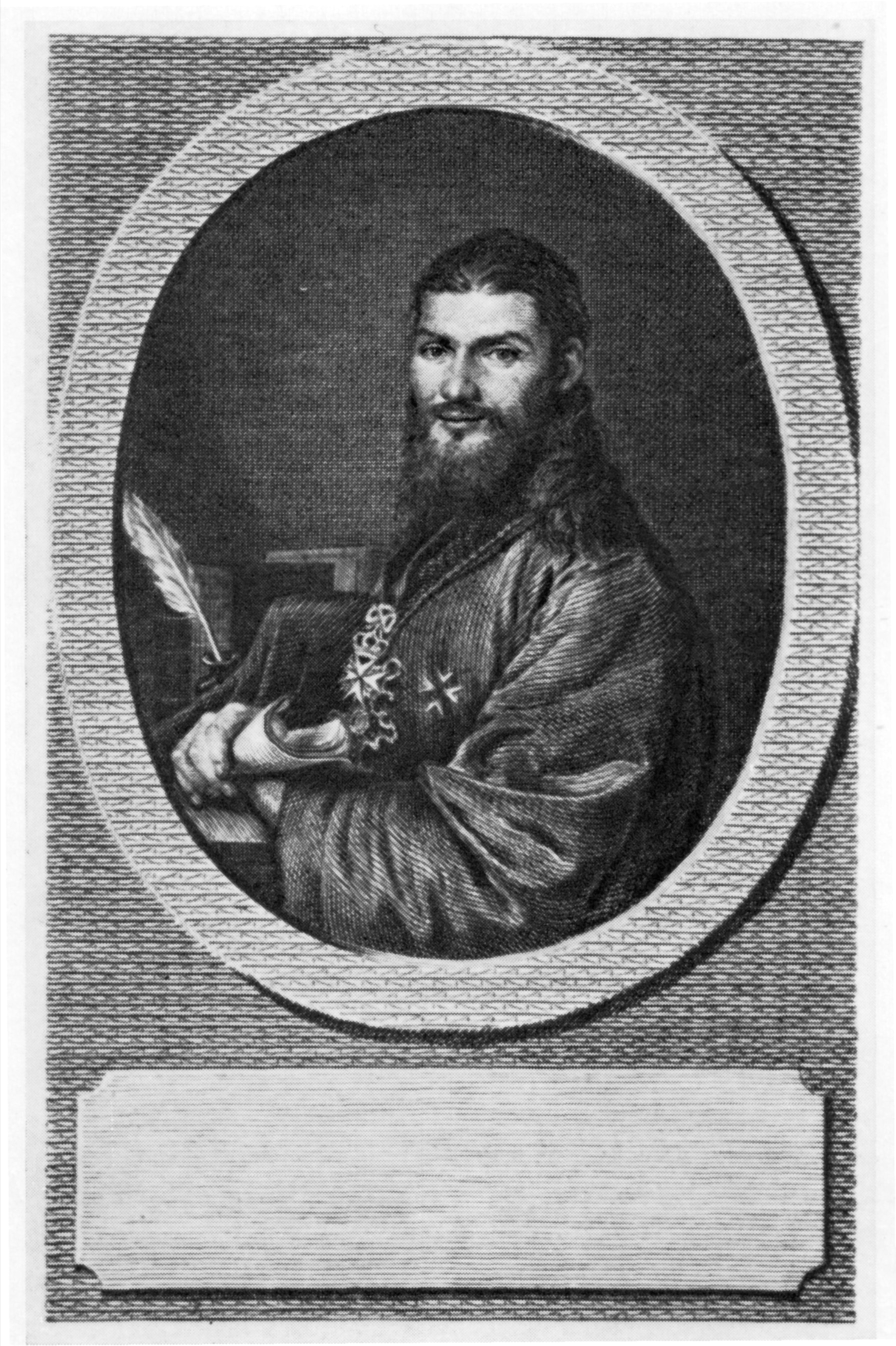 Портрет Матвея Десницкого. С оригинала Д.Г. Левицкого. Офорт, Резец, 1790